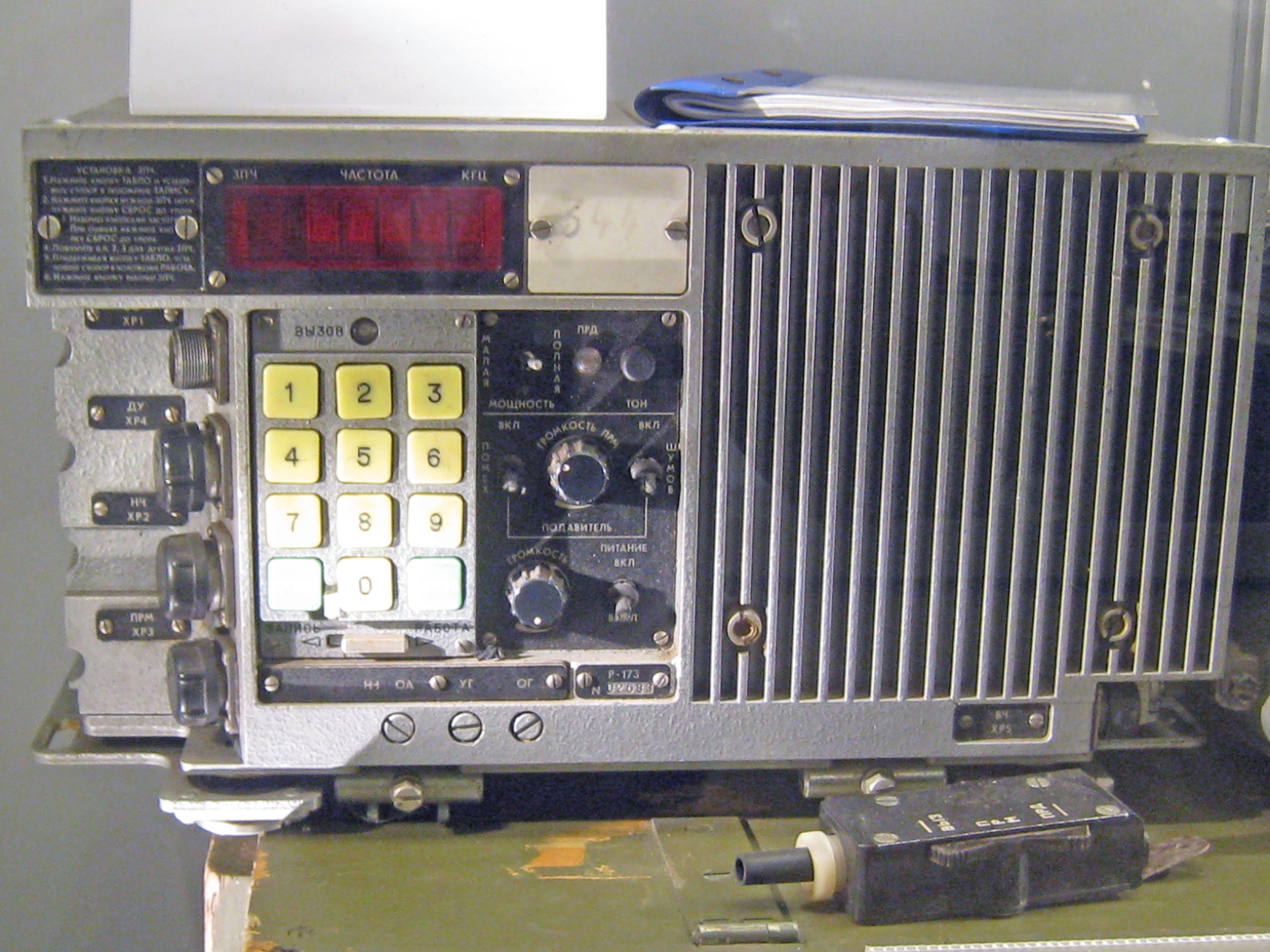 Funkstation R-173 im Festungsmuseum Reuenthal